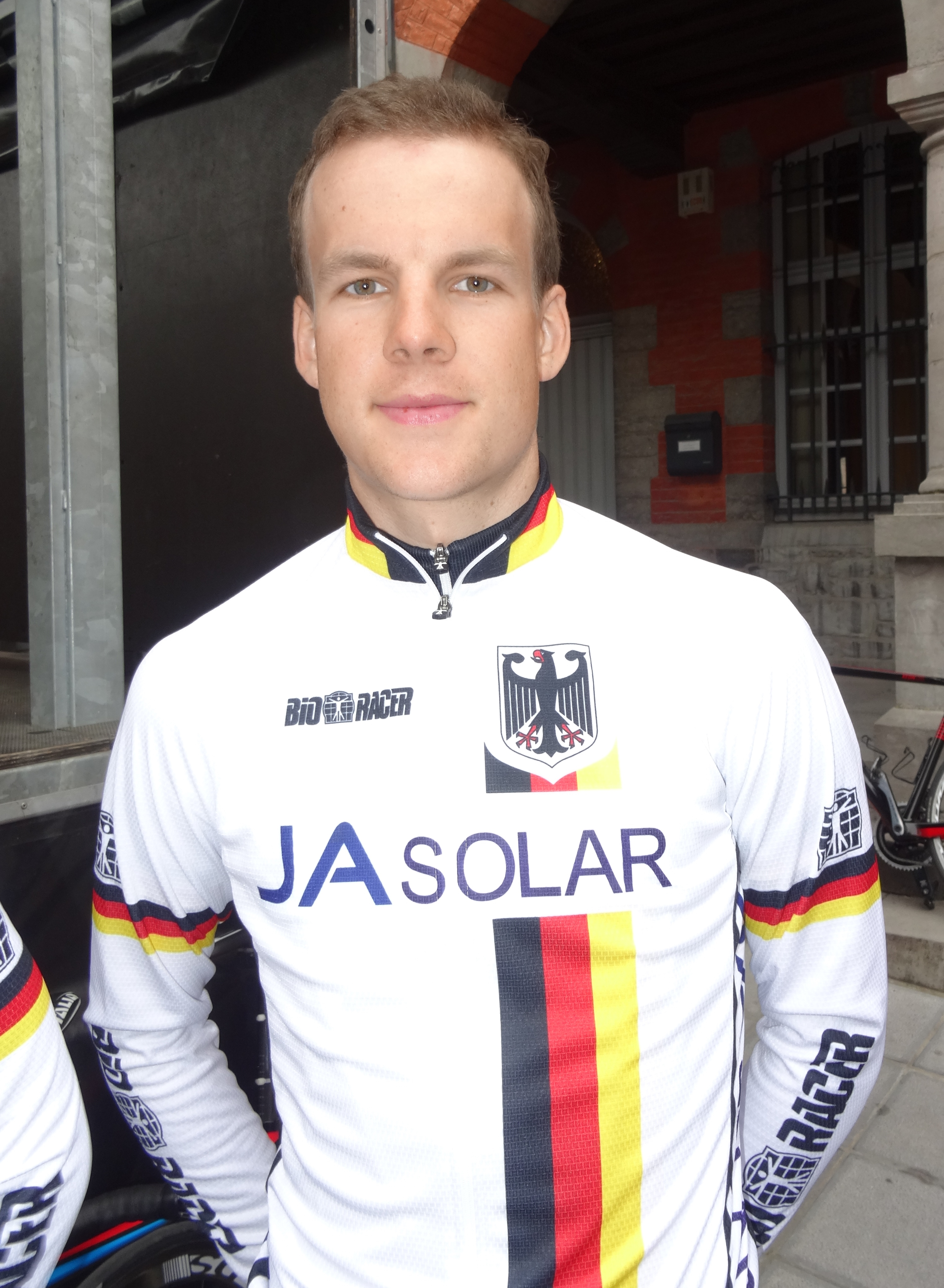 Triptyque des Monts et Châteaux 2014, étape 1, 4 avril 2014, départ d'Antoing. Depicted person: Jonas Koch Depicted team: Équipe nationale d'Allemagne espoirs The creation of these files was made possible thanks to the organizers of the Triptyque des Monts et Châteaux 2014 English | français | +/−